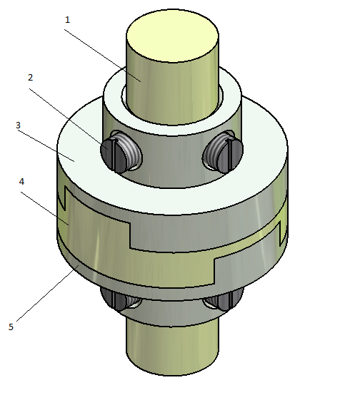 Sprzęgło Oldhama - schemat